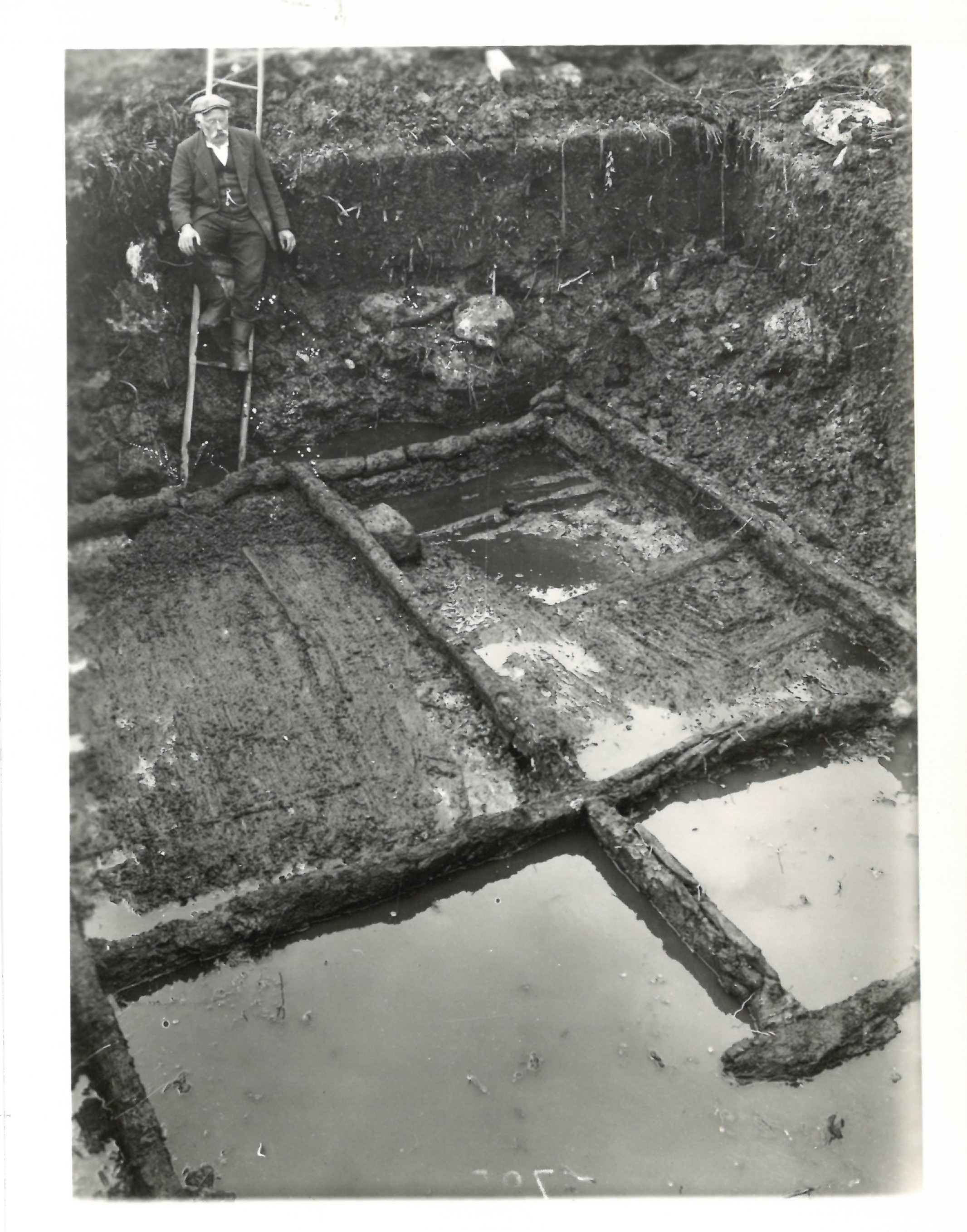 Nachlass Reinhold Bosch im Besitz der Kantonsarchäologie Aargau Mappe Seengen-Riesi Foto Unterbau eines Flechtwandhauses der Moorbaute Riesi am Hallwilersee in Seengen September 1923 In den Jahren 1923 und 1925 führte Reinhold Bosch Ausgrabungen in der Seeufersiedlung von Seengen-Riesi durch, die in die Spätbronzezeit (11. – 9. Jh. v. Chr.) datiert. Insbesondere wurde im September 1923 der Unterbau eines Pfahlbaus freigelegt.